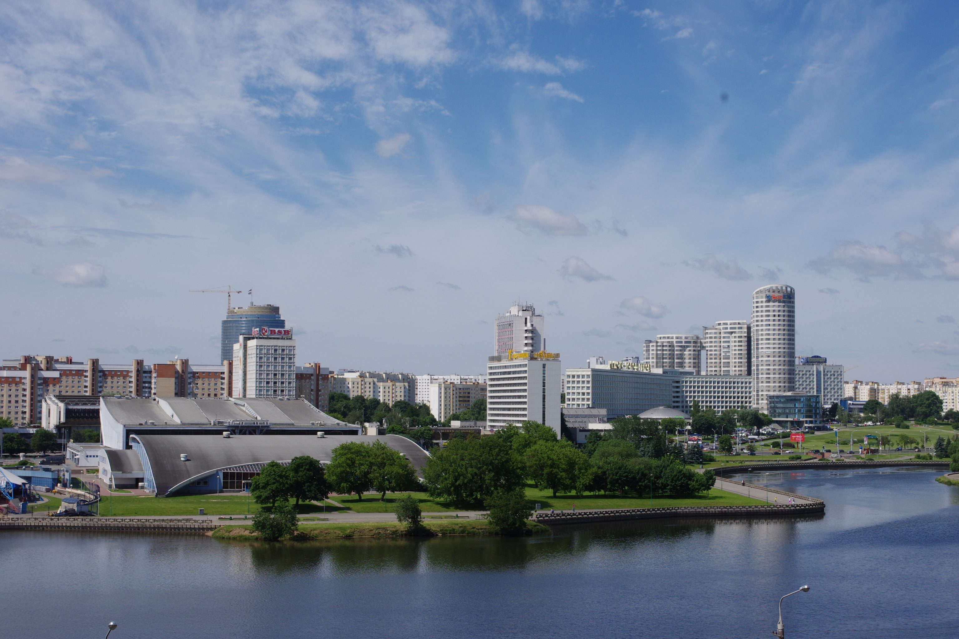 Minsk, Belarus